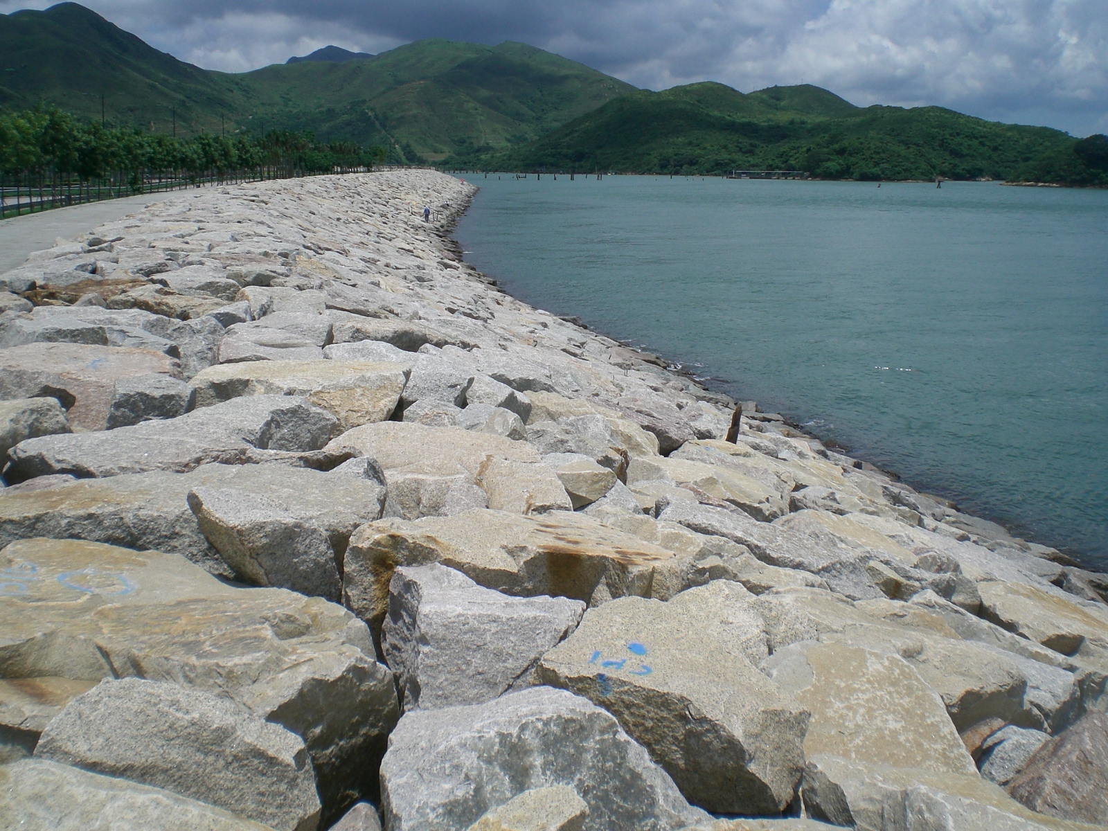 大嶼山欣澳道望zh:夏天大石人造海岸石灘